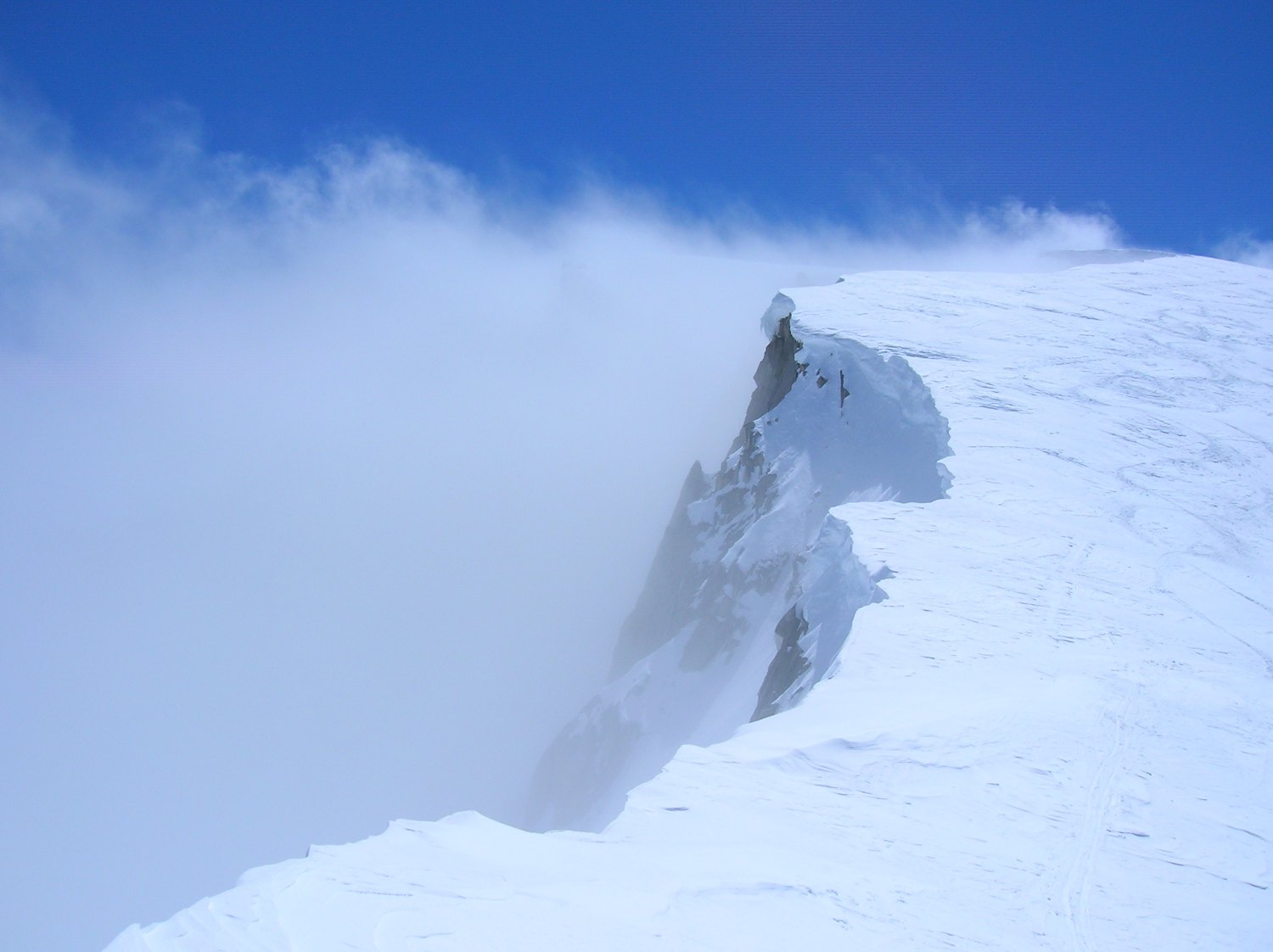 (Vorderes) Galmihorn summit, Valais